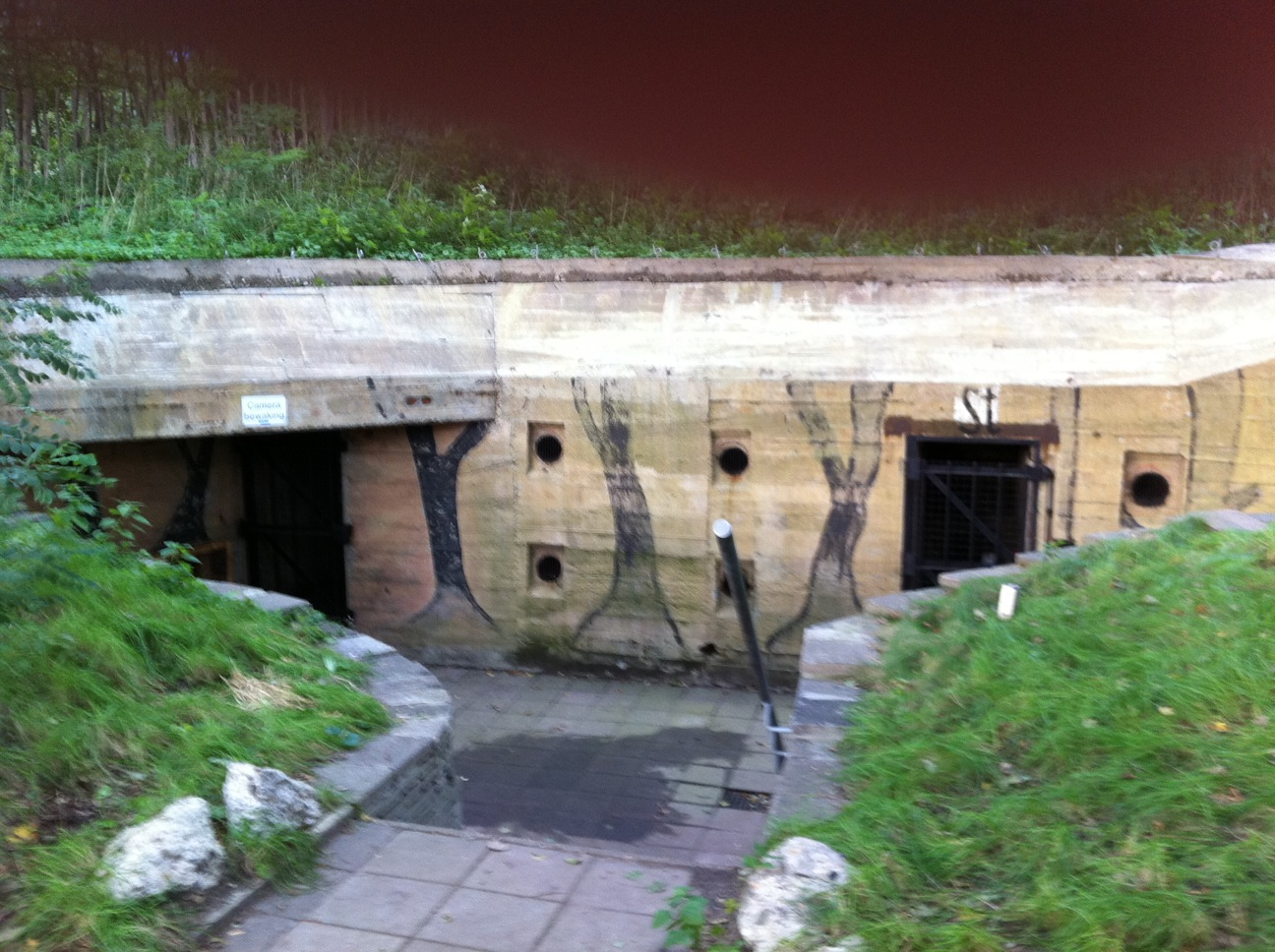 Commandobunker Badhuisweg Den Haag (3de Wereldoorlog)